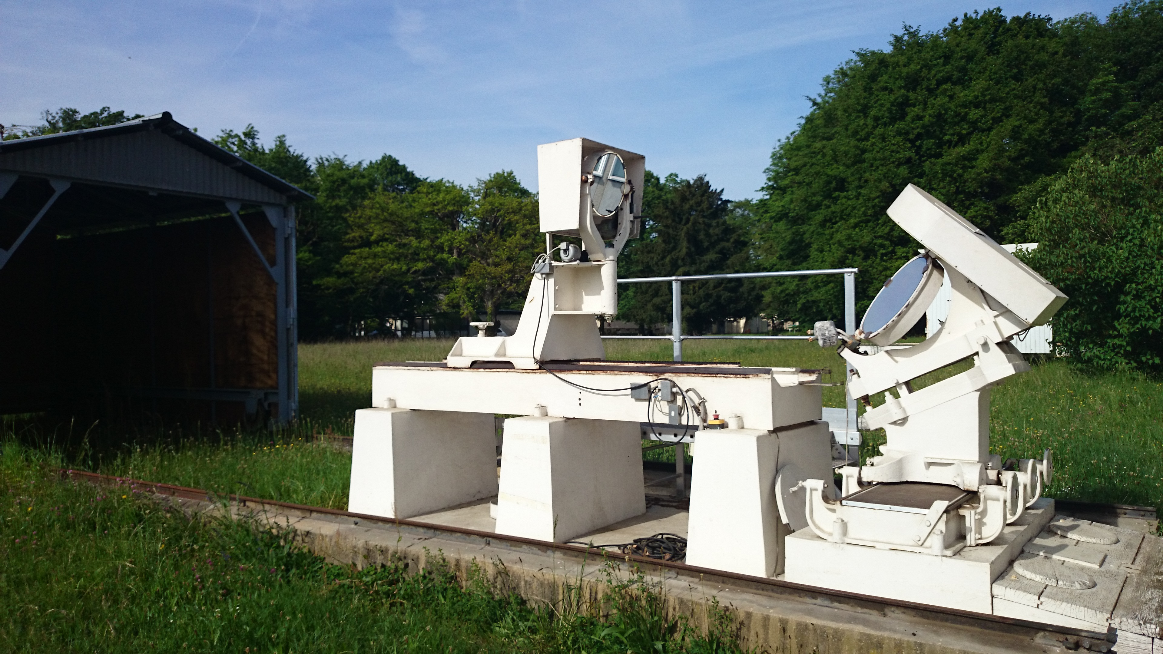 Coelostat du spectrohéliographe de Meudon